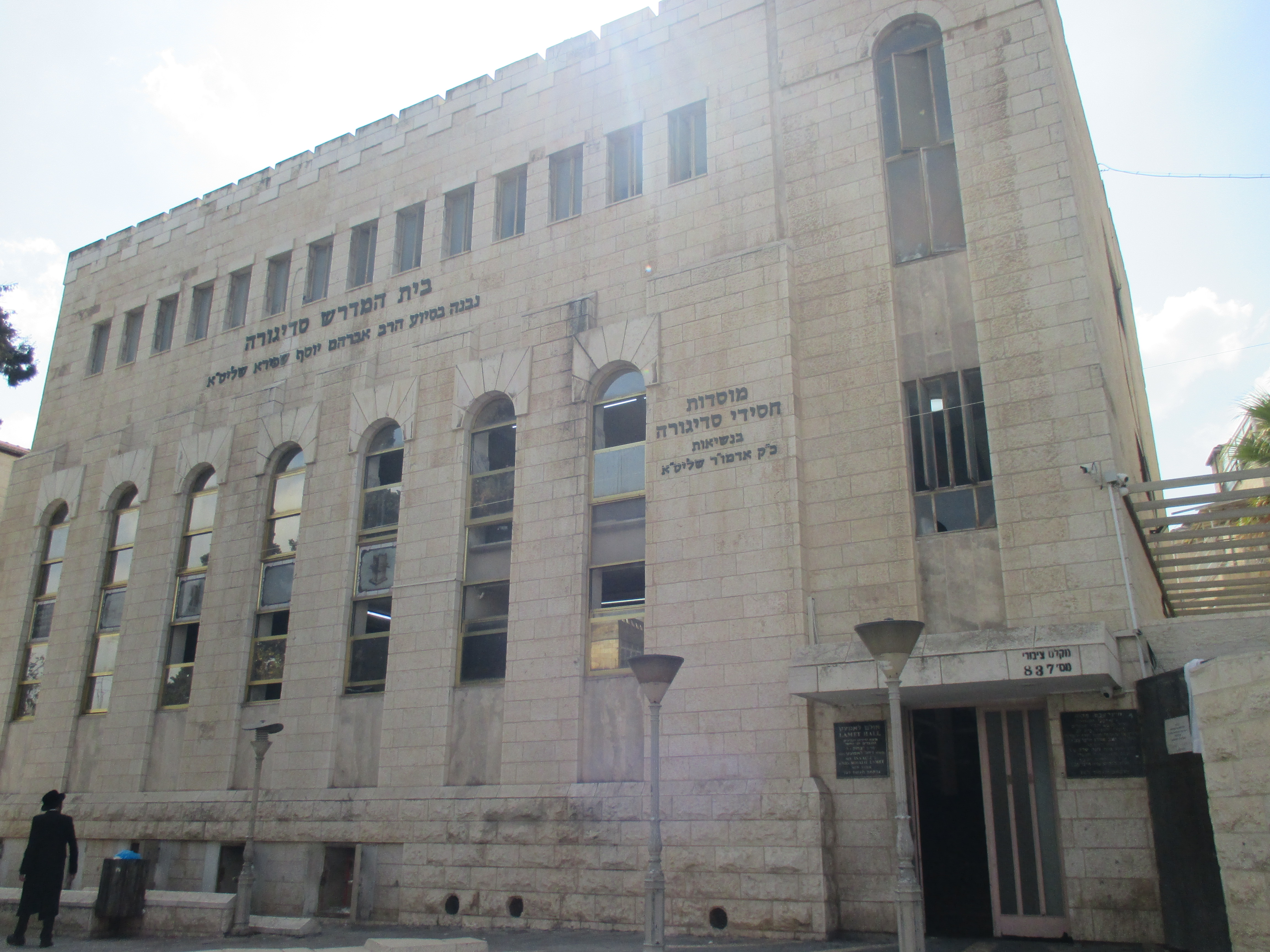 בית הכנסת סדיגורא ברחוב שמואל הנביא בירושלים.